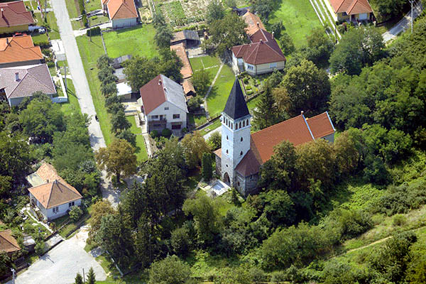 Légi fotó a nyékládházai római katolikus templomról